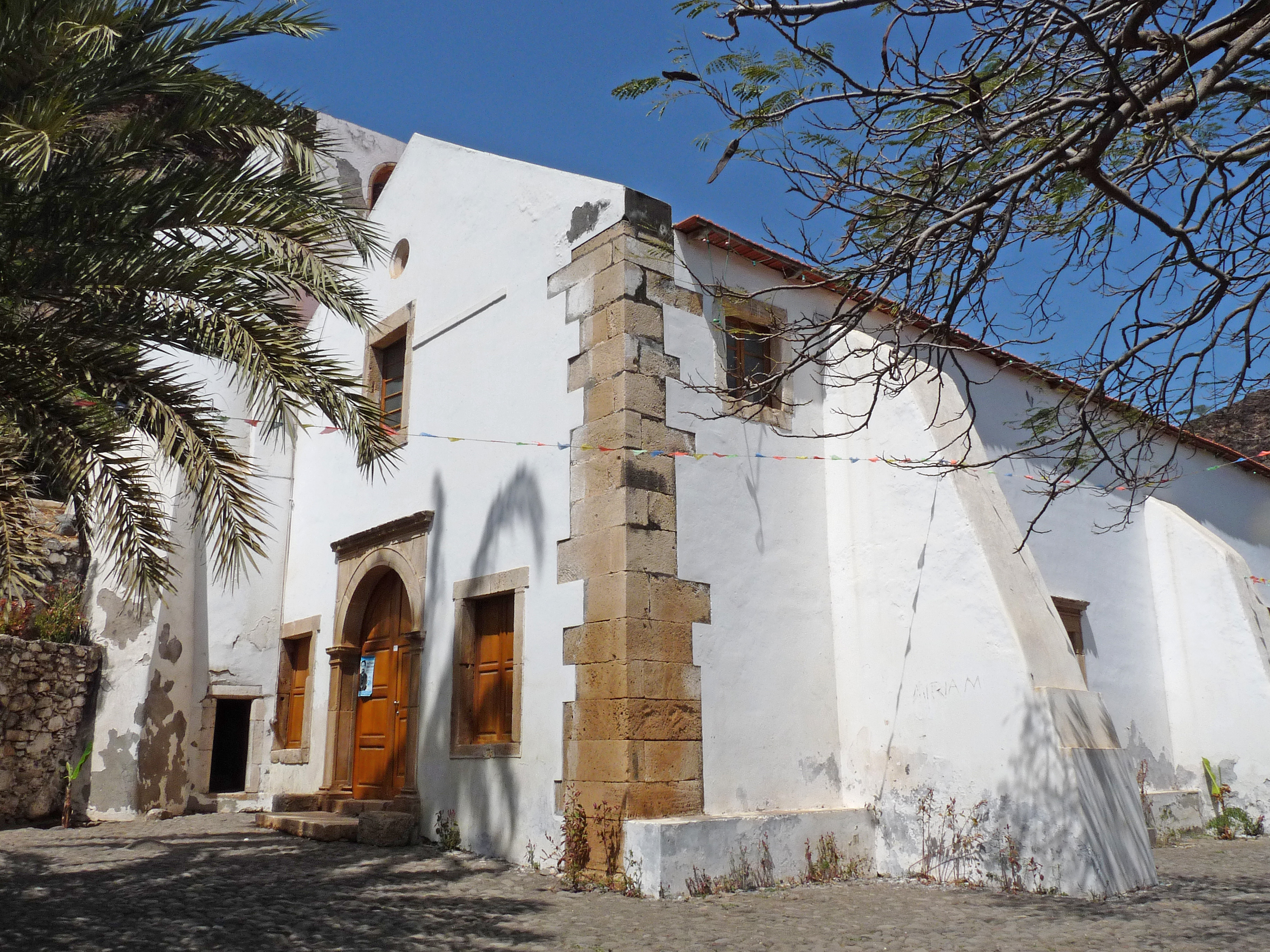 Cidade Velha (île de Santiago, Cap-Vert) : Eglise Nossa Senhora do Rosário